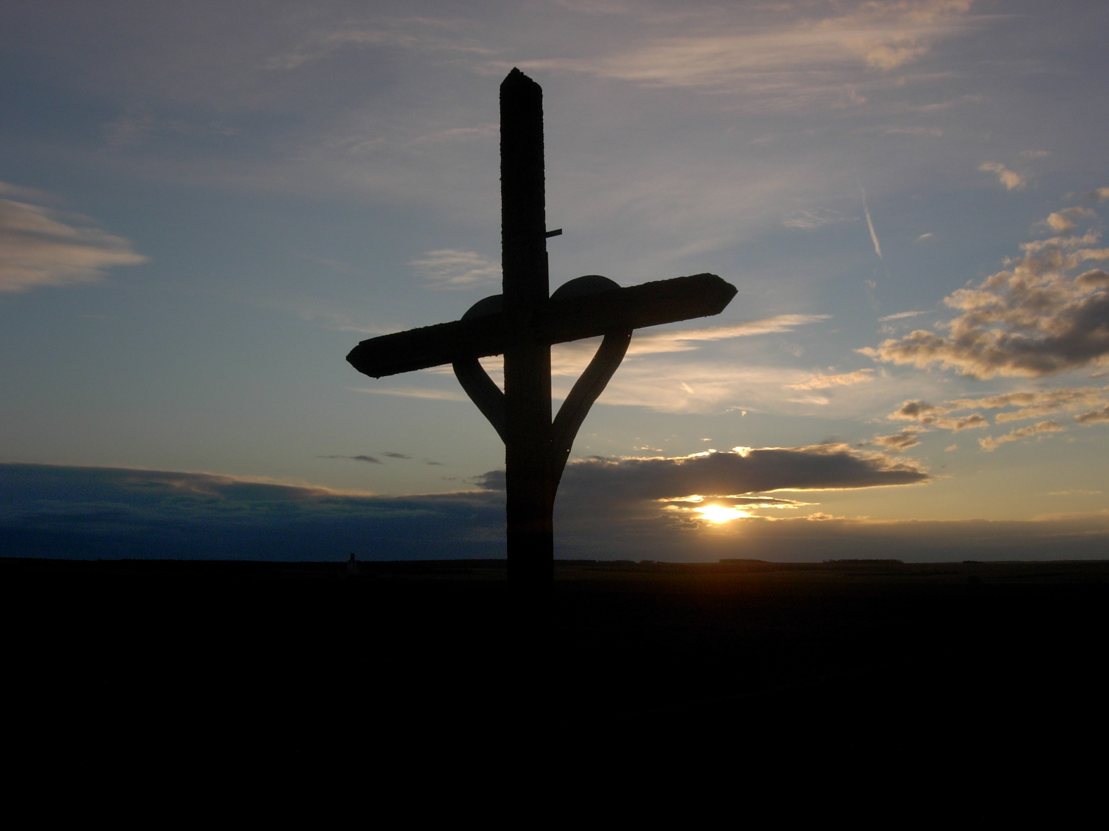 Croix de chemins de Dierrey-Saint-Pierre, route de Prunay-Belleville